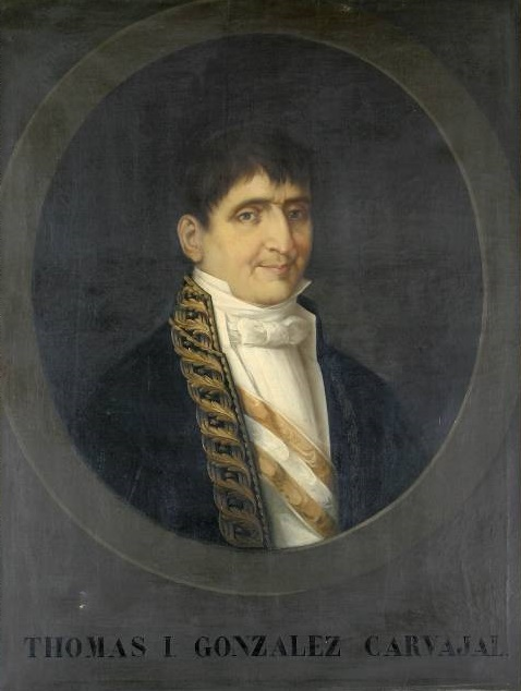 Retrato del traductor, poeta, hebraísta, estadista y político español Tomás González Carvajal (1753-1834).